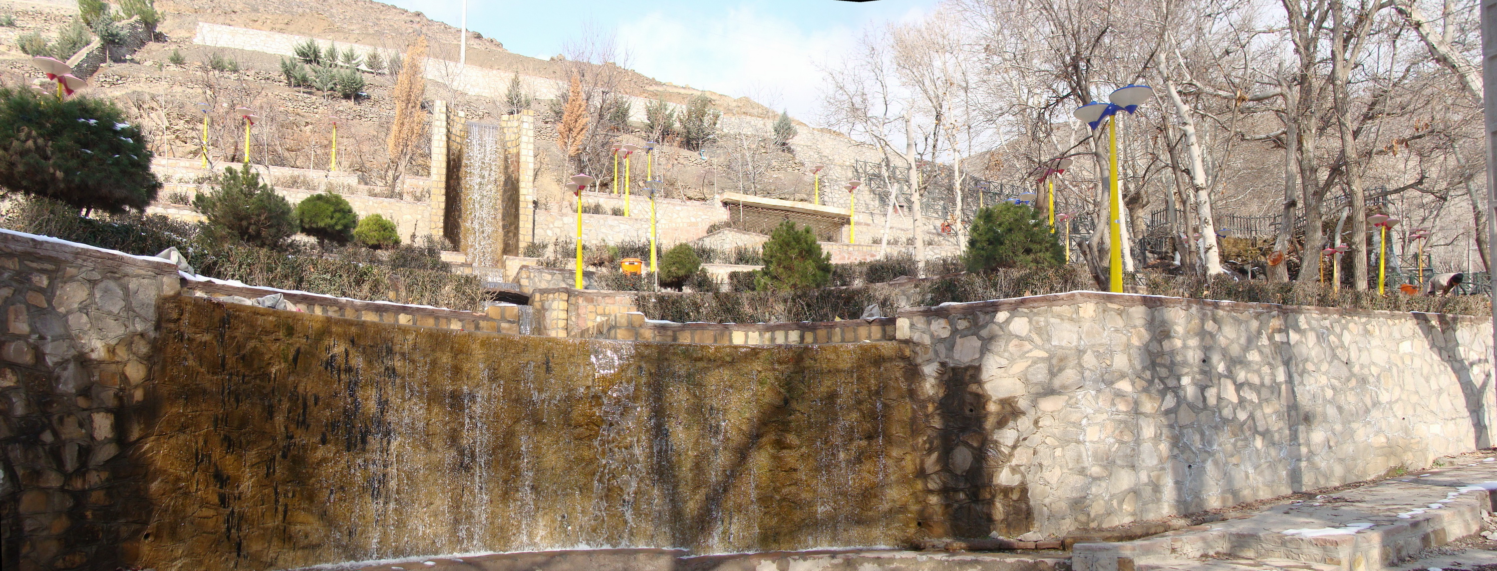 Darrud_non-natural_Waterfall